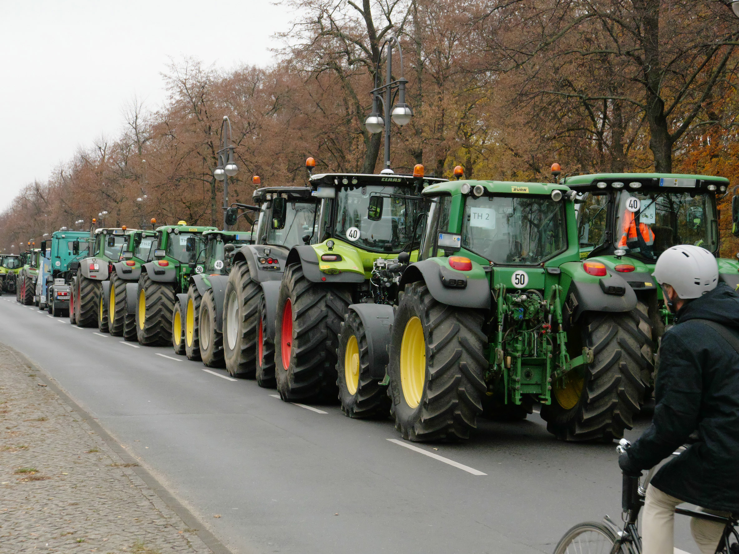 Auf der Hofjägerallee abgestellte Traktoren bei der Demonstration der deutschen Landwirte am 26. November 2019 in Berlin. Blick Richtung Großer Stern.